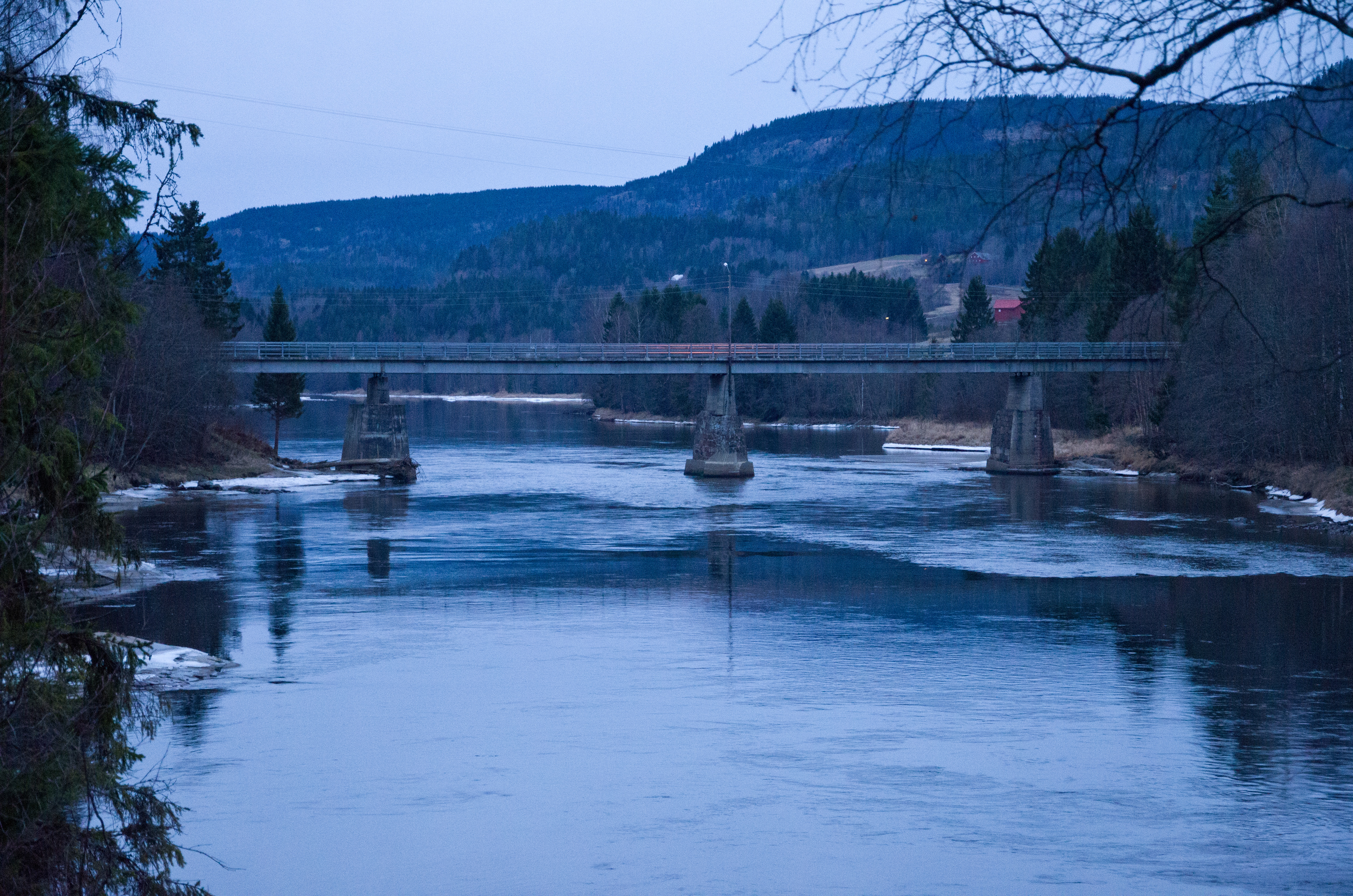 Hukstrøm bru over Lågen i Lardal, Vestfold